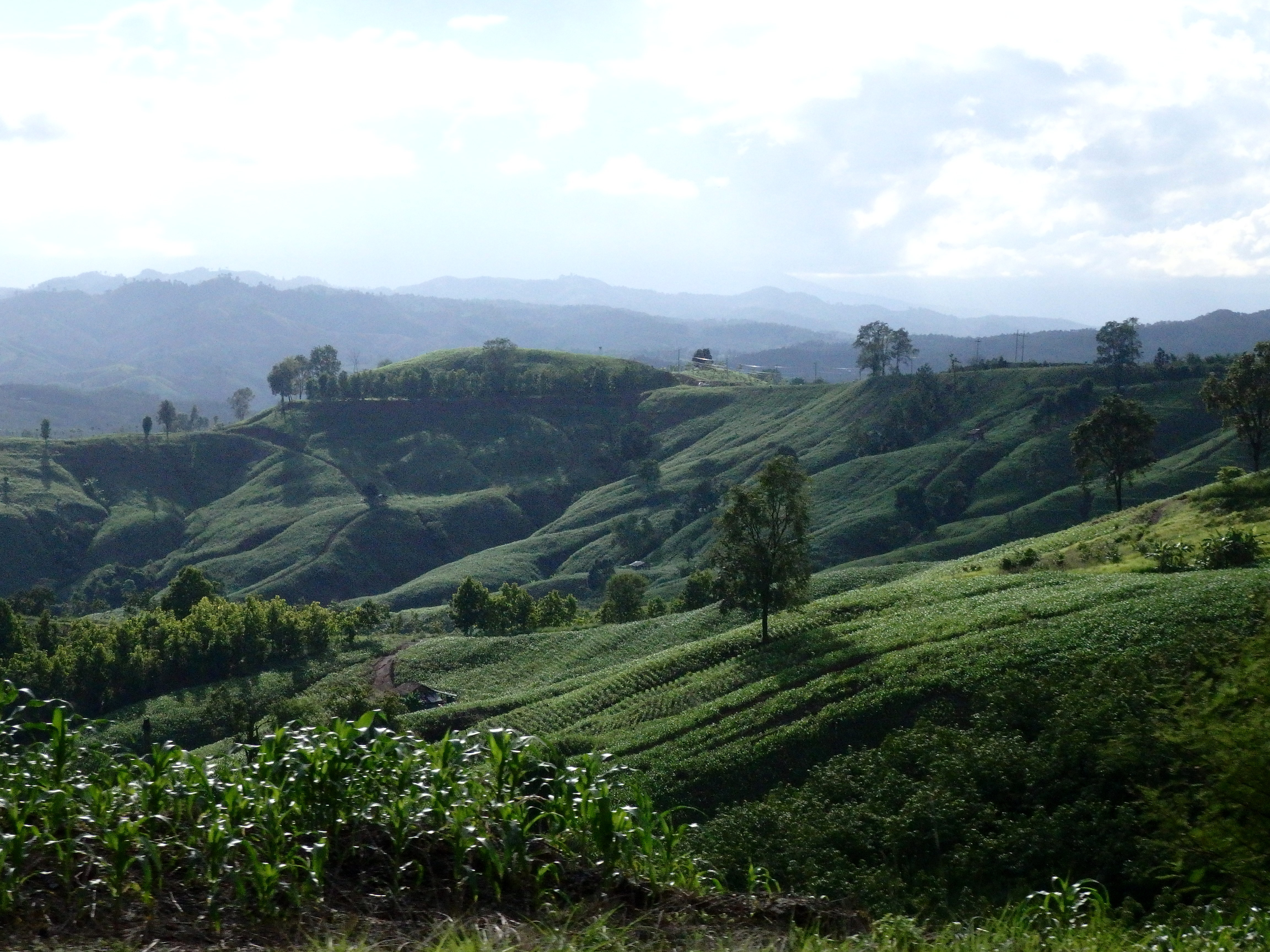 Pa Laeo Luang, Santi Suk District, Nan 55210, Thailand